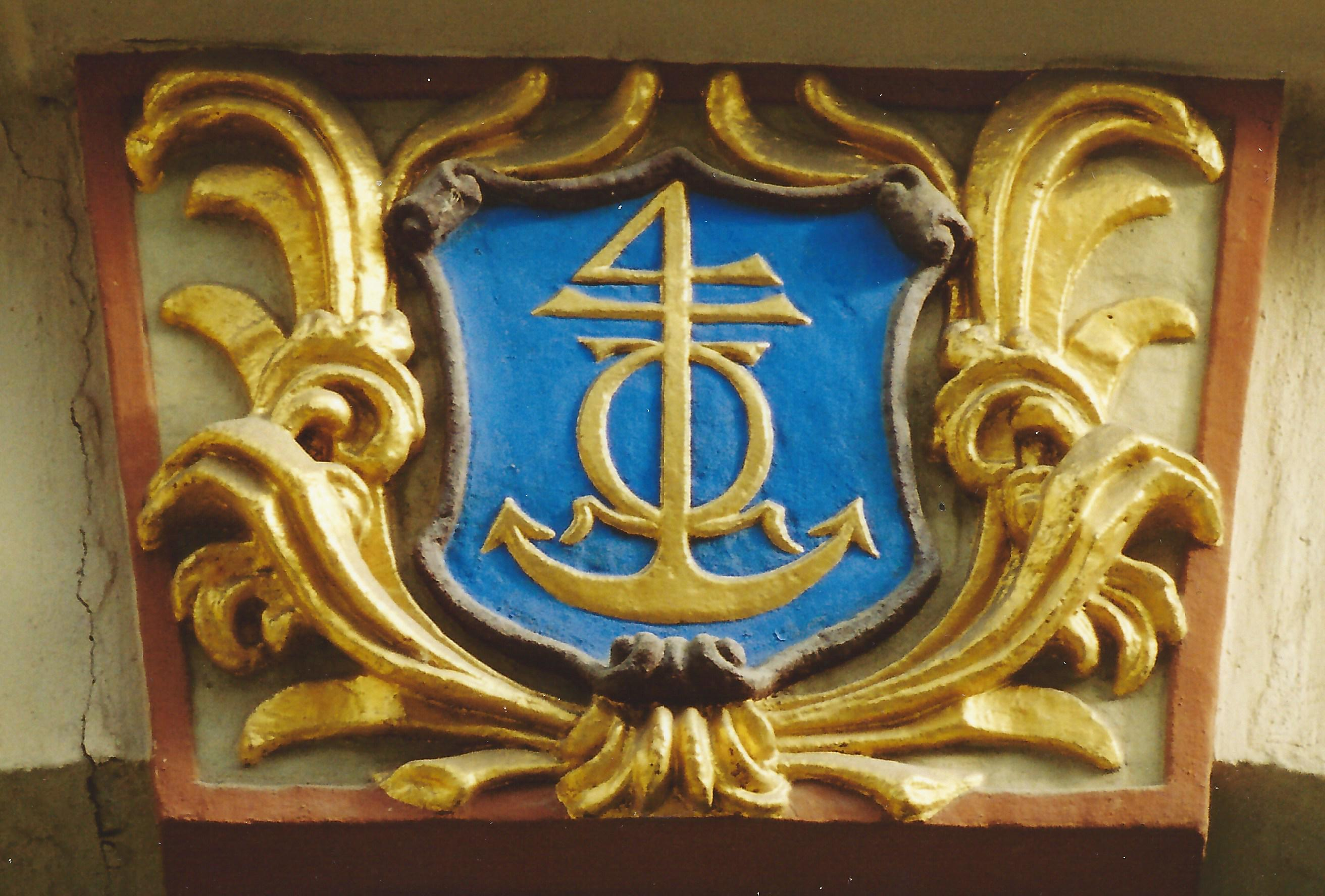 Das Wappen der Leinenwebergroß- und Überseehändler Görner am Portal der Rittergasse 6 in Löbau in Sachsen